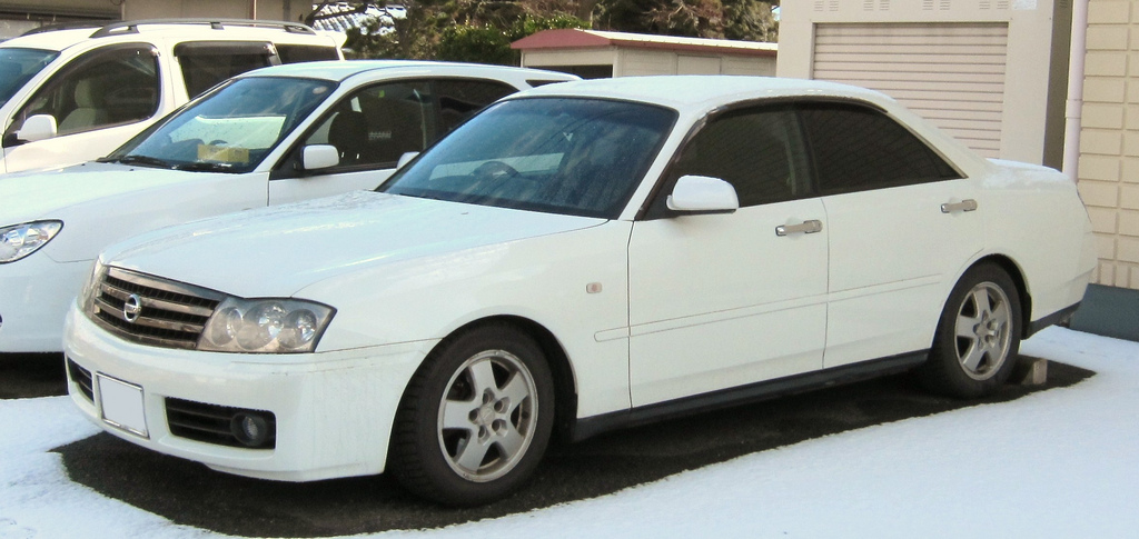 Nissan Gloria Y34.